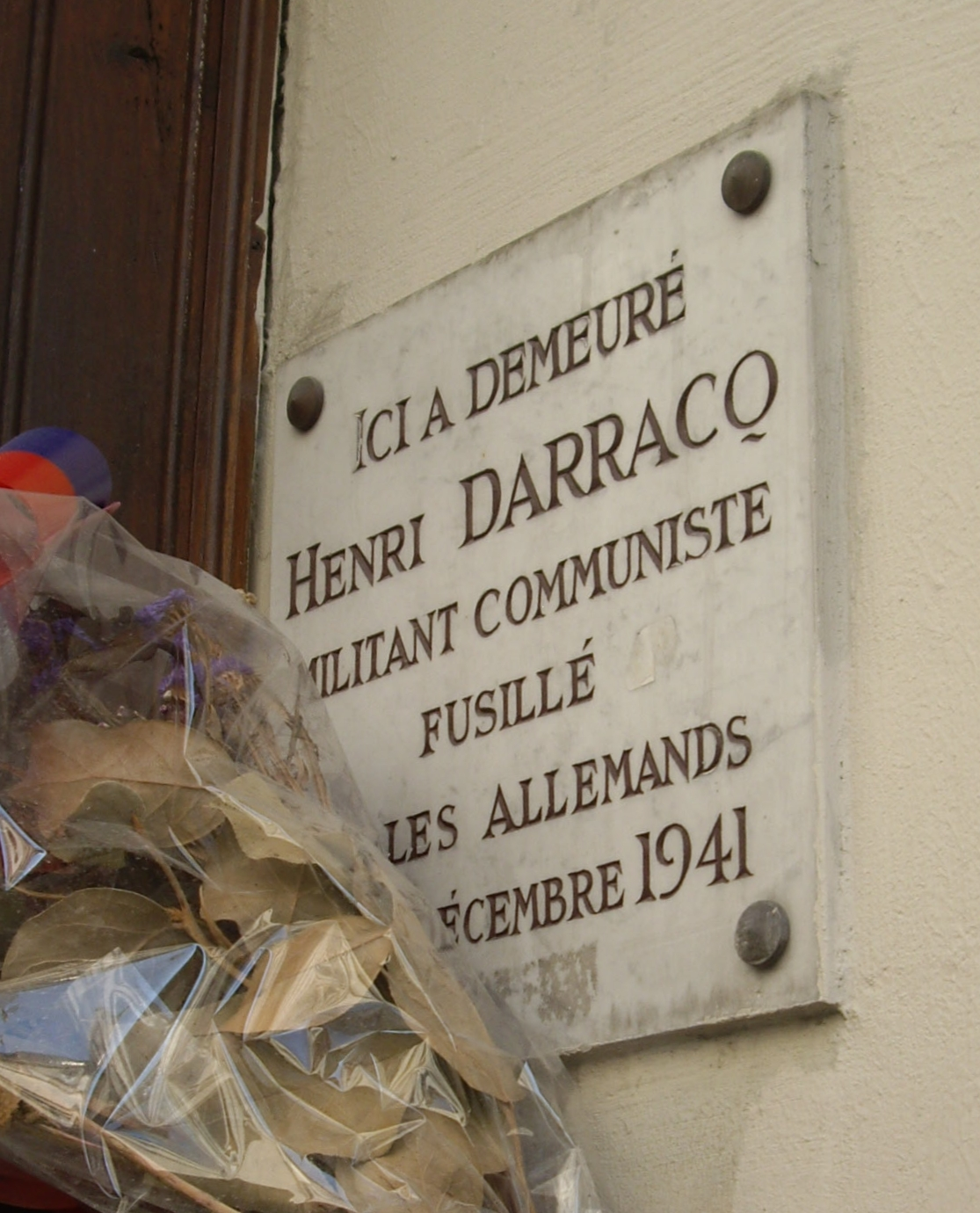 Plaque apposée au n° 3 de la rue Sainte-Anastase, Paris 3e. « Ici a demeuré Henri Darracq, militant communiste fusillé par les Allemands le 15 décembre 1941. »